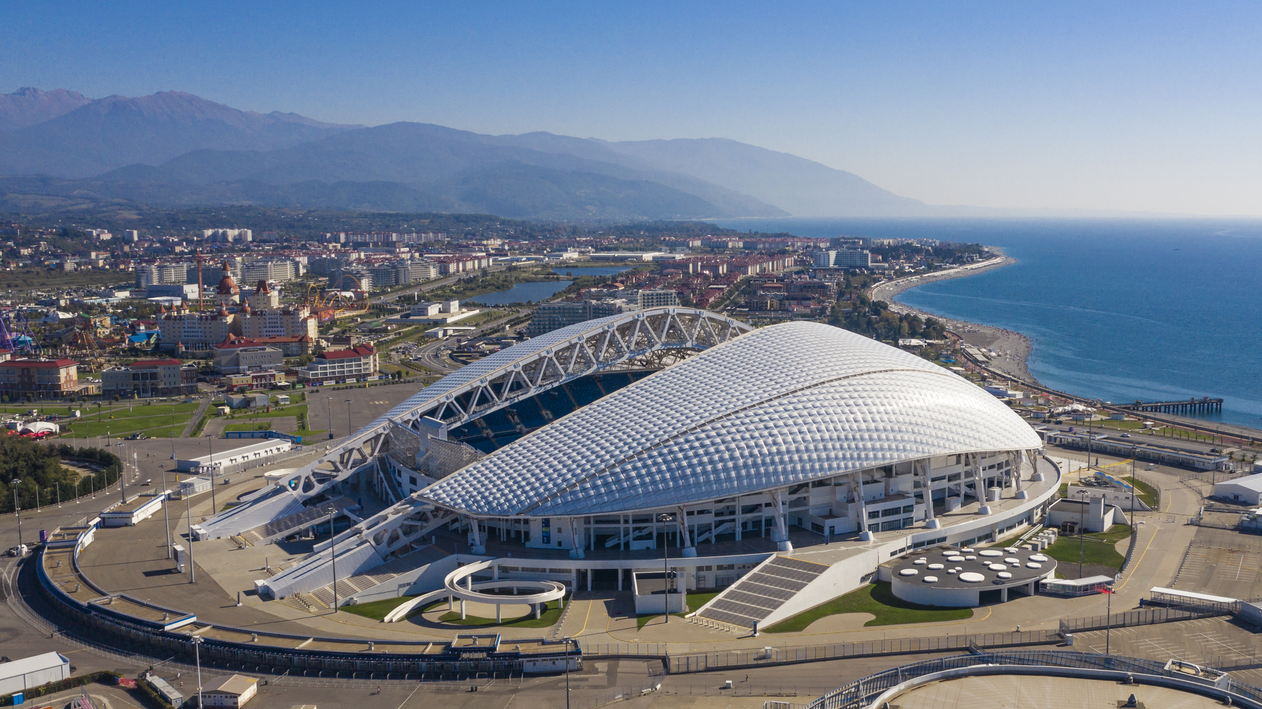 Blick auf den Olympiapark Adler (Sotschi)